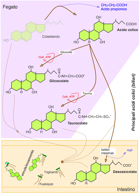 Biosintesi di acidi colici principali Prodotto: P. Forster, 28.5.05 .graffle Fonte: inedito; secondo G. Vogel, H. Angermann: dtv-Atlas Biologie, Band II; ISBN 3-423-03222-7, Deutscher Taschenbuch Verlag, München 1998